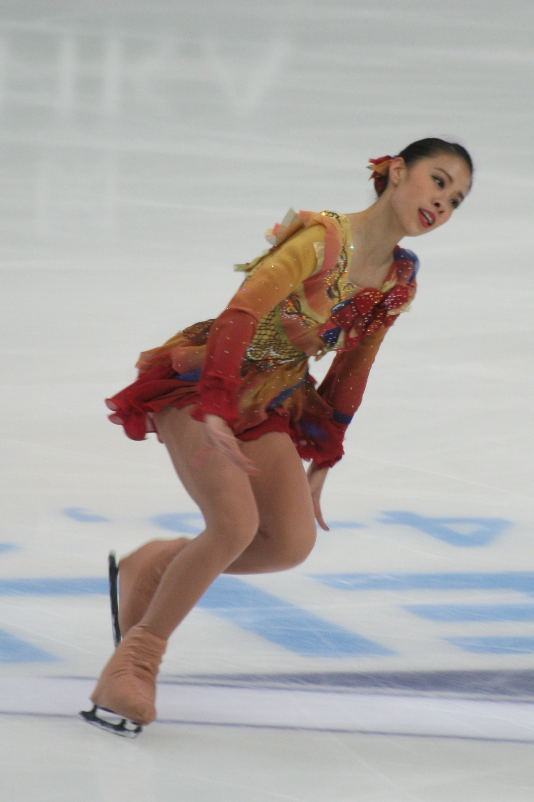 Юра Мацуда (Япония) на Кубке Ростелекома 2016.